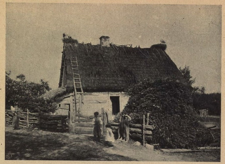 Materiały z wystawy Architektury Polskiej, urządzonej w 1915 r. staraniem Koła Architektów i Towarzystwa Opieki nad Zabytkami Przeszłości w Warszawie.